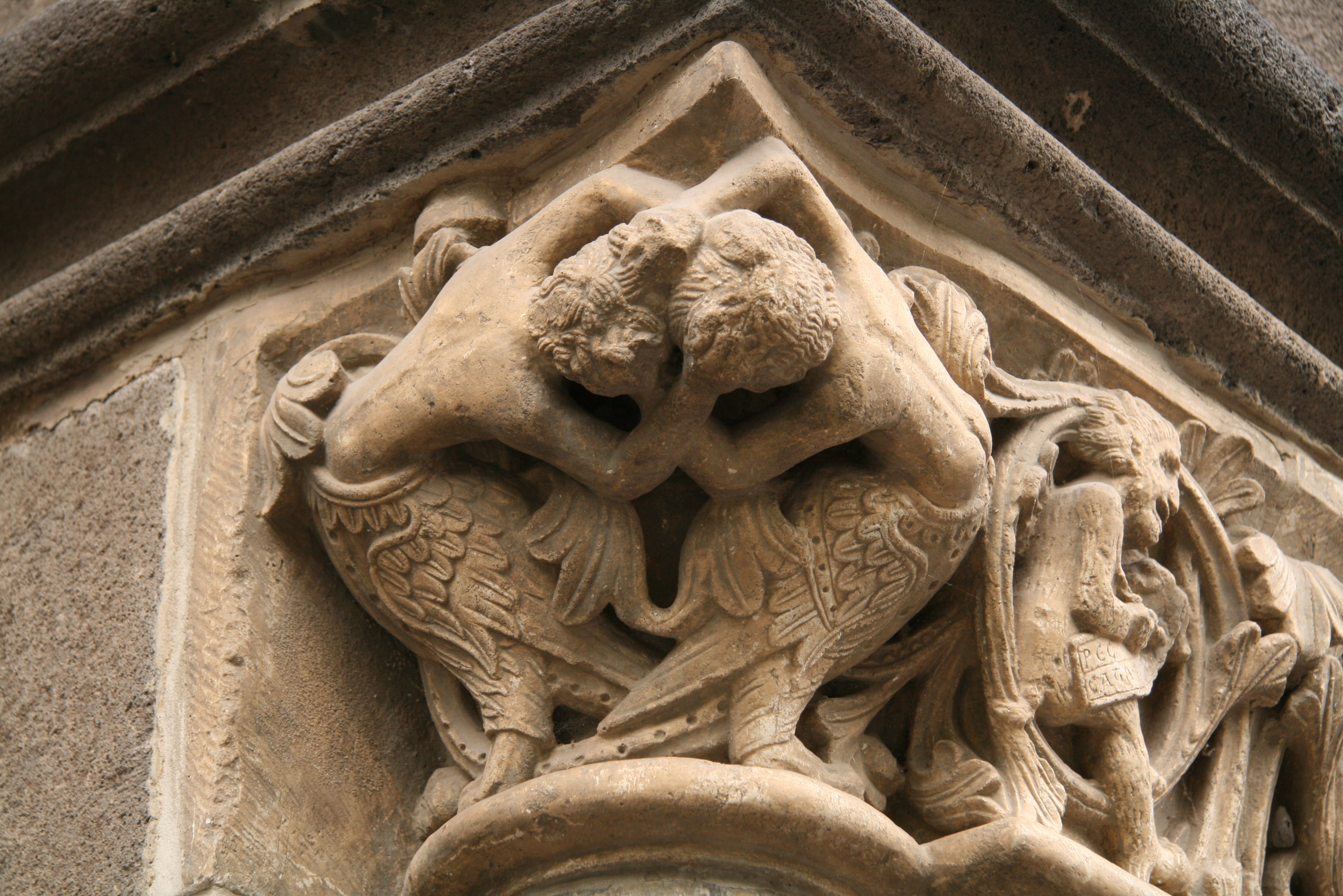 Paradies, Mittelportal außen in Maria Laach - die Haareraufer